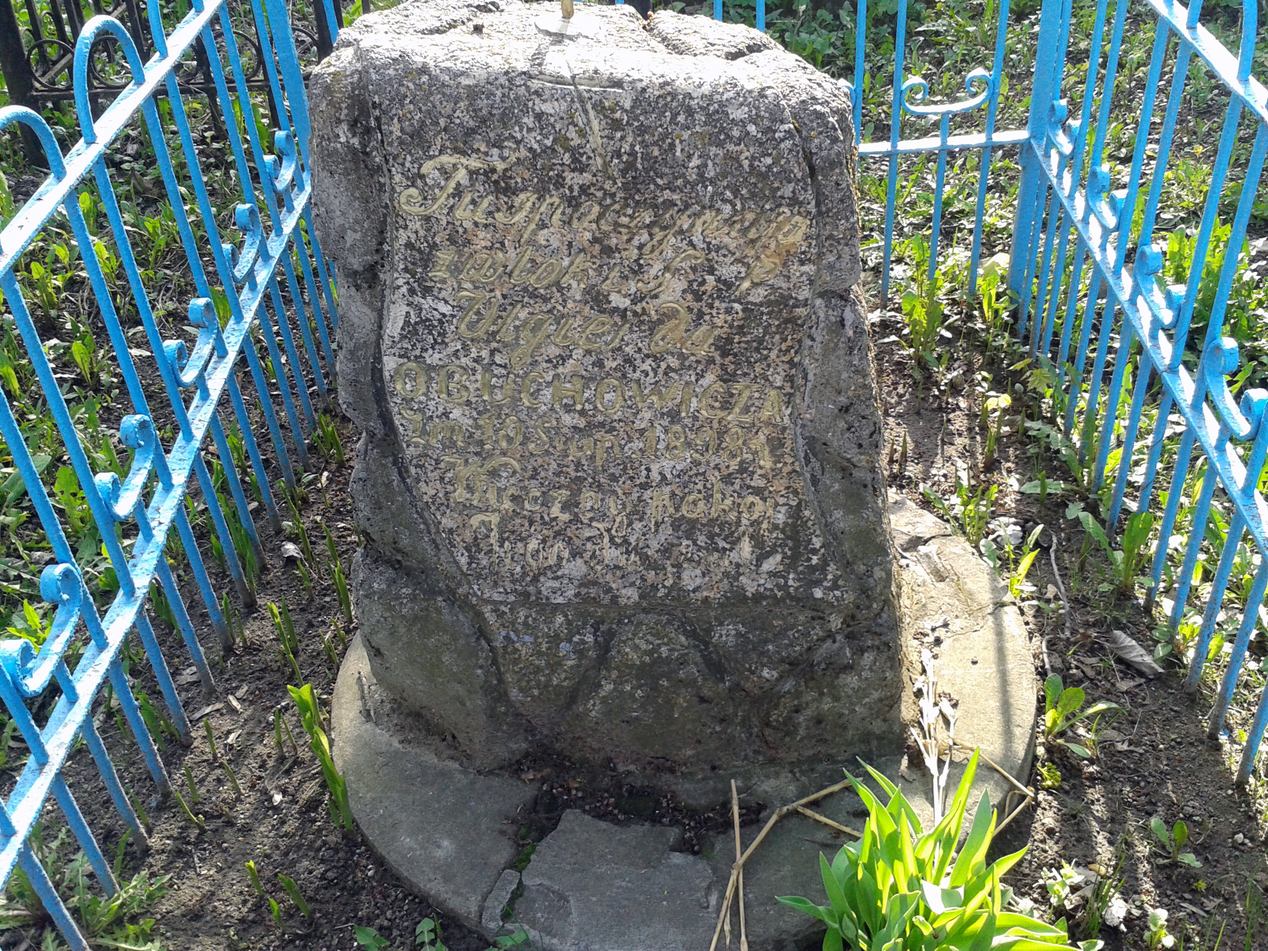 Беларуская (тарашкевіца): Магіла Альгерда Абуховіча.